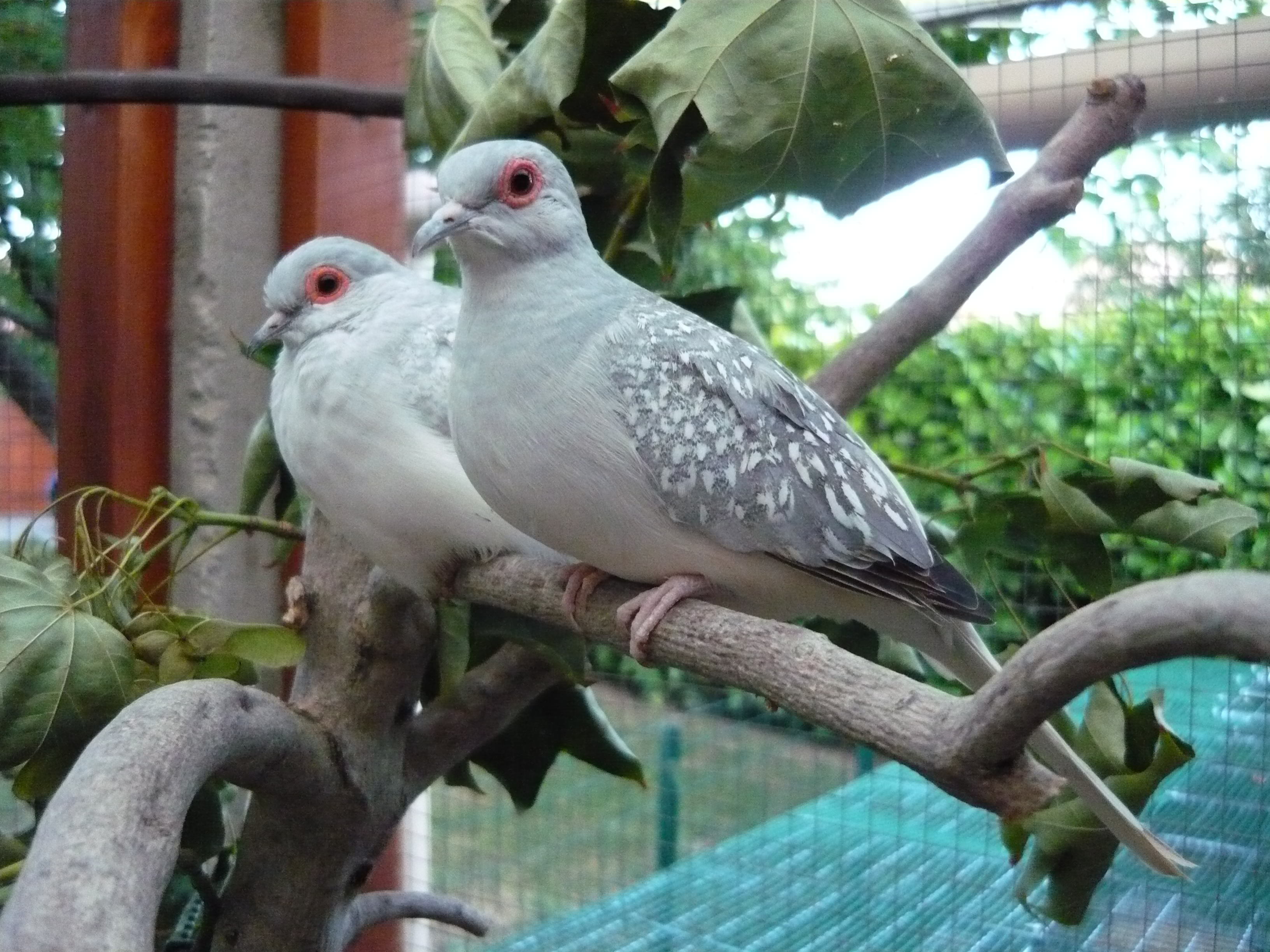 Couple de colombes diamant mutation argenté